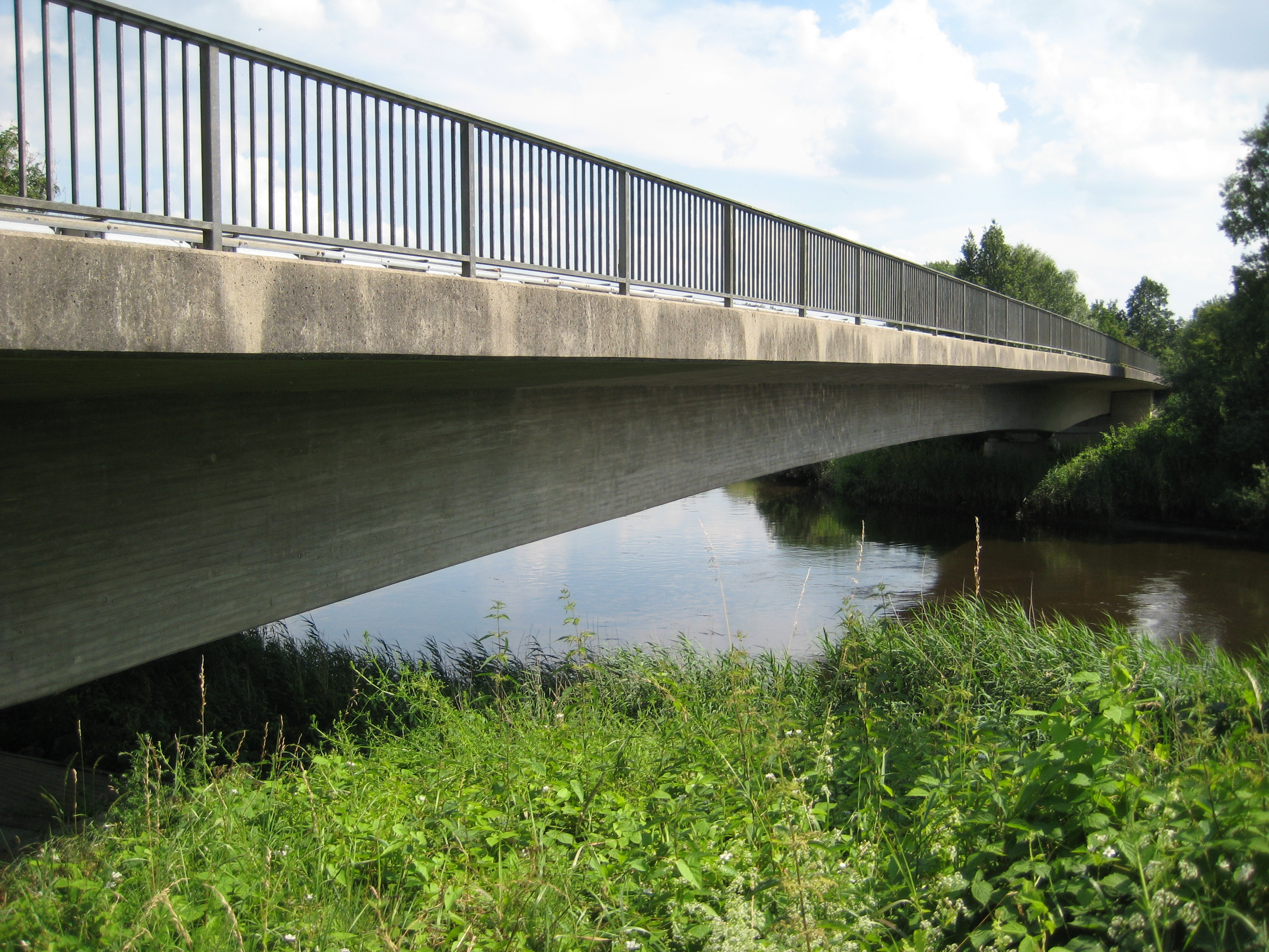 Brücke Breitenburger Fähre über die Stör